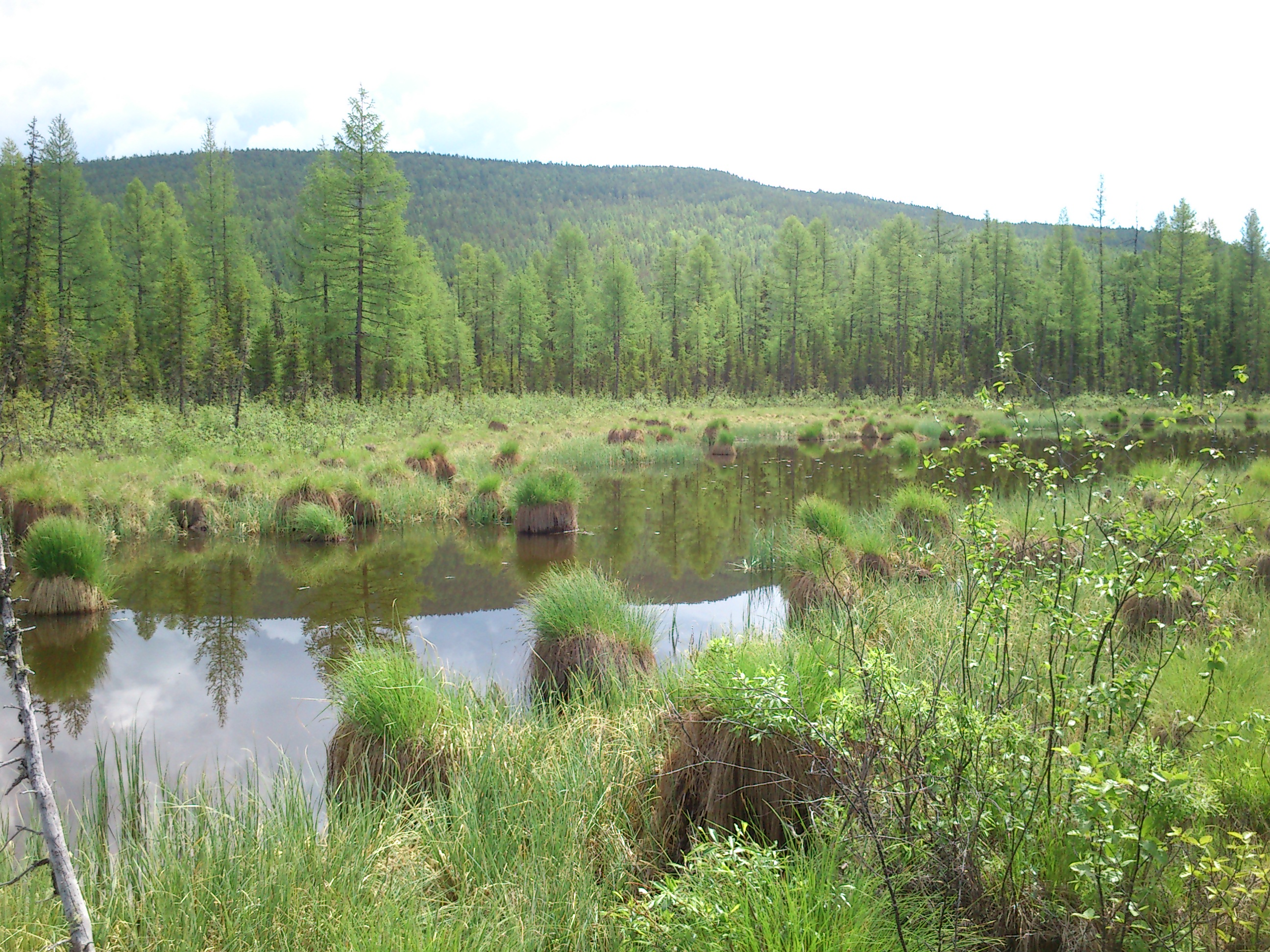 Байкало-Ленский заповедник, Качугский район This image is related to the protected area of Russia number 3800183